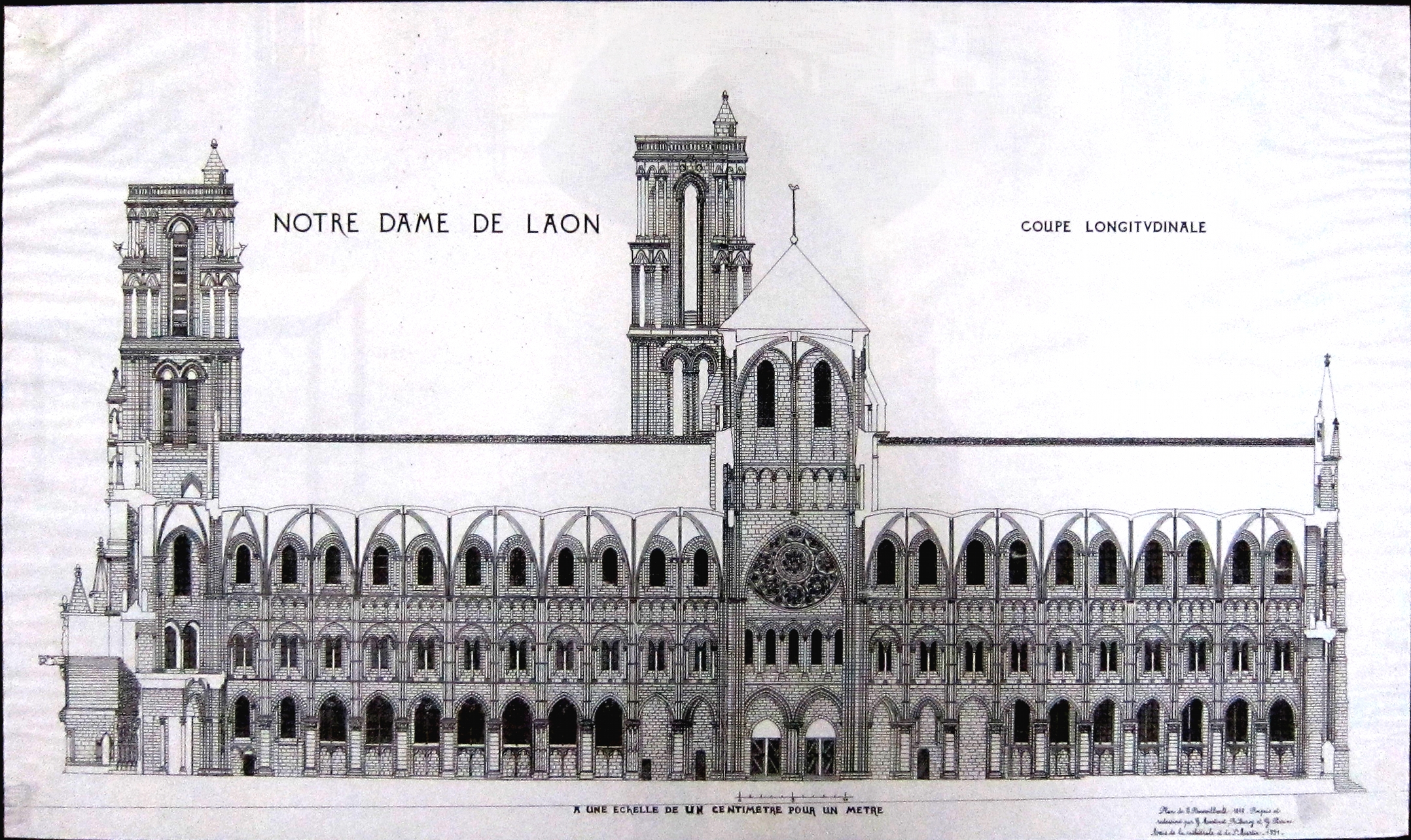 Plan de coupe de la cathédrale de Laon (Aisne).